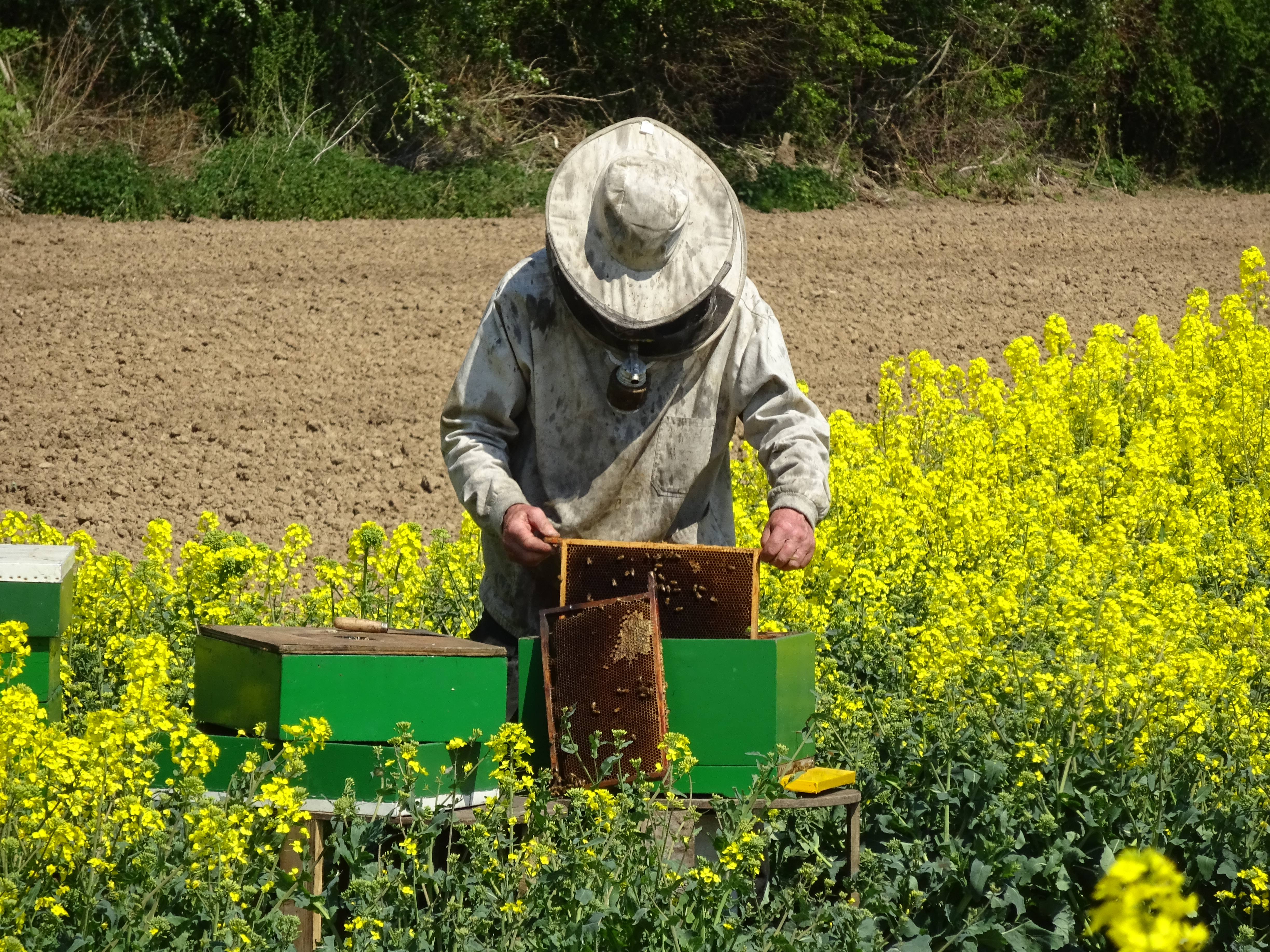 Nederlandse imker controleert zijn bijenkasten aan een koolzaadveld in Kalkar-Bylerward, Duitsland